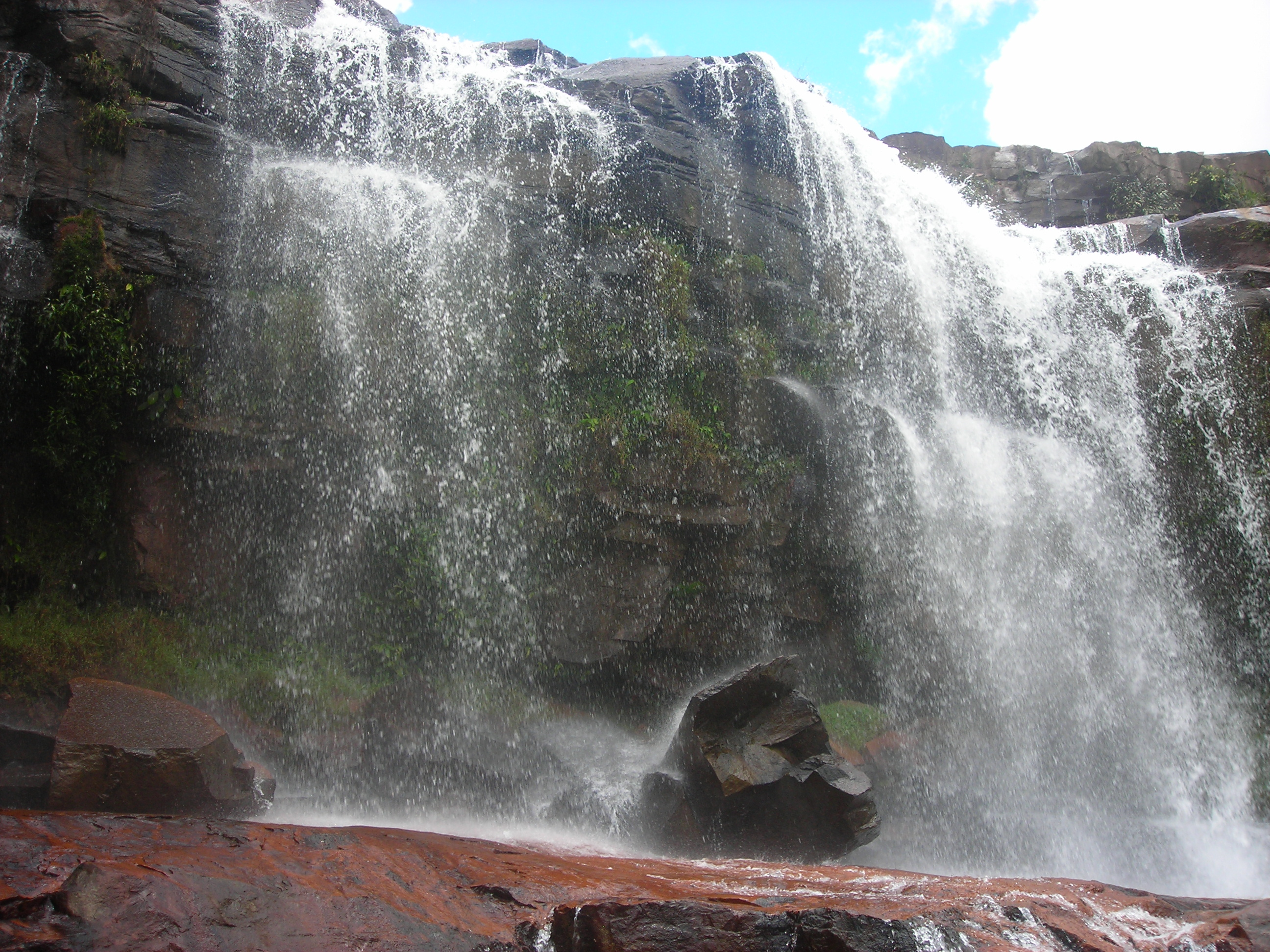 Cachoeira do Pacheco (Pacheco Waterfall), Venezuela